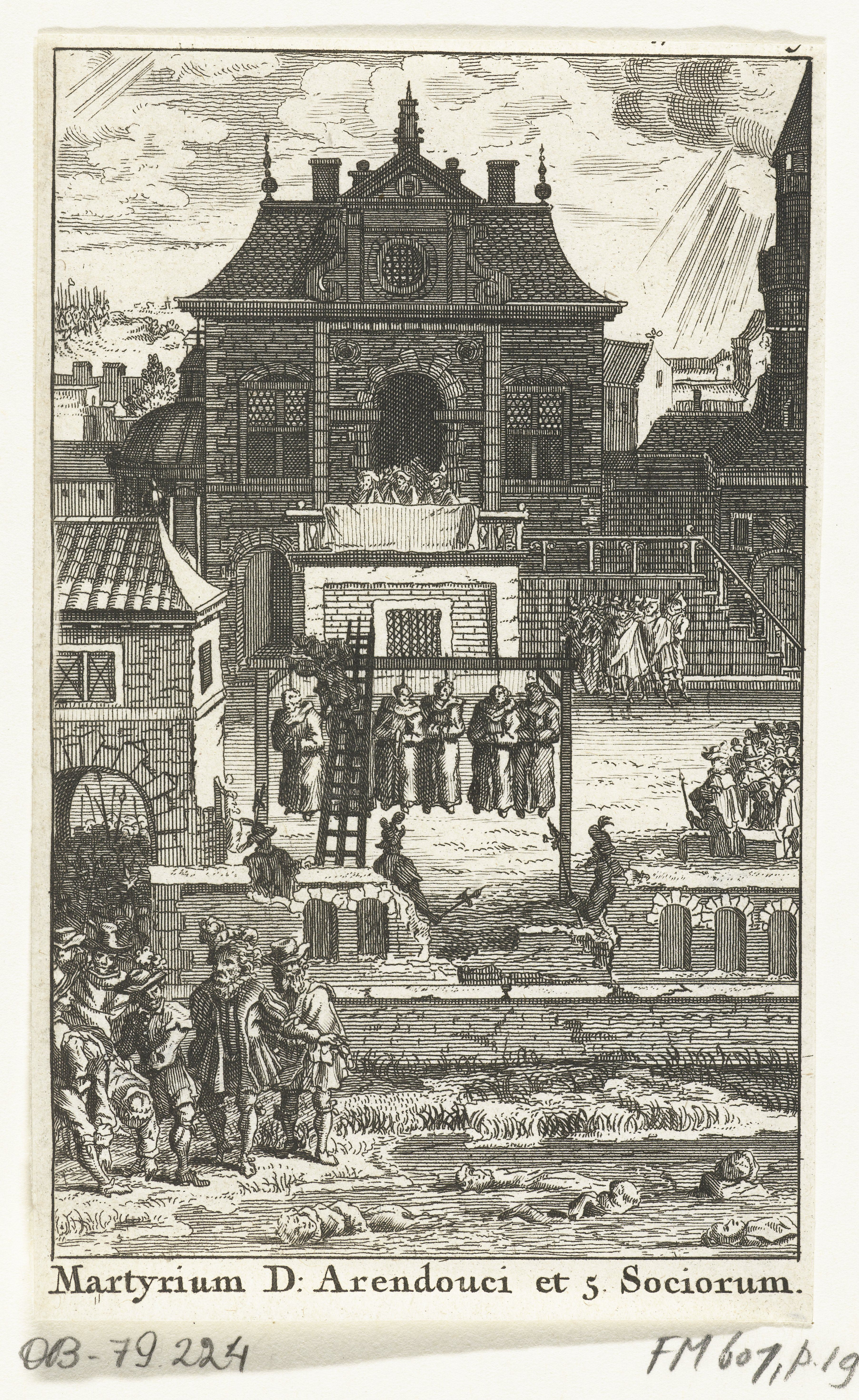 IdentificatieTitel(s): Pater Daniel Arendonk en vijf broeders opgehangen te Alkmaar, 1572Martyrium D: Arendouci et 5. Sociorum (titel op object)Objecttype: prent historieprent Objectnummer: RP-P-OB-79.224Catalogusreferentie: FMH 607Atlas van Stolk 475Omschrijving: Martelaarschap van pater Daniel Arendonk en vijf broeders, opgehangen te Alkmaar, 1572.VervaardigingVervaardiger: prentmaker: anoniemPlaats vervaardiging: NederlandenDatering: 1698 - 1700Fysieke kenmerken: etsMateriaal: papier Techniek: etsenAfmetingen: blad: h 138 mm × b 85 mmToelichtingGebruikt als illustratie in: P. Opmeer, Martelaars-boek, ofte Historie der Hollandse martelaren, P. van der Meersche, Leiden 1700, p. 19.OnderwerpWat: violent death by hangingBeleg van Alkmaar (1573)Tachtigjarige OorlogWanneer: 1572 - 1572Waar: AlkmaarWie: Daniel ArendonkVerwerving en rechtenVerwerving: aankoop 1881Copyright: Publiek domein